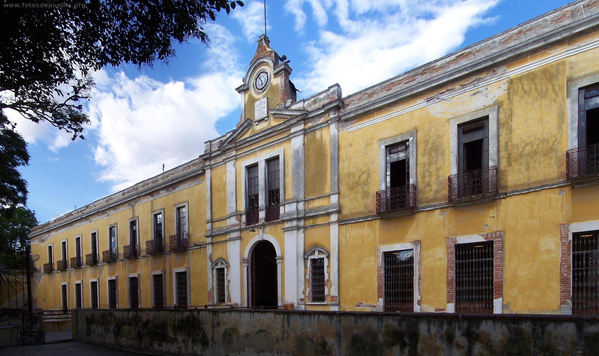 Fachada interior de la fabrica